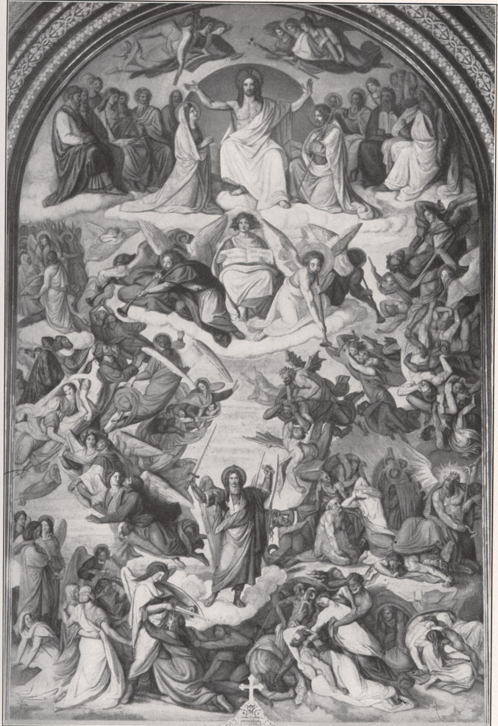 Peter von Cornelius, Jüngstes Gericht, Fresko in der St.-Ludwig-Kirche in München. Druck.